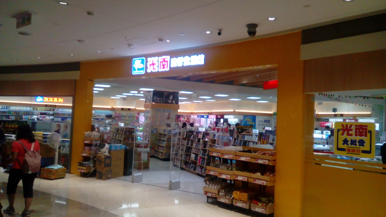 光南流行生活館高雄夢時代店，位於統一夢時代購物中心藍鯨館2樓。